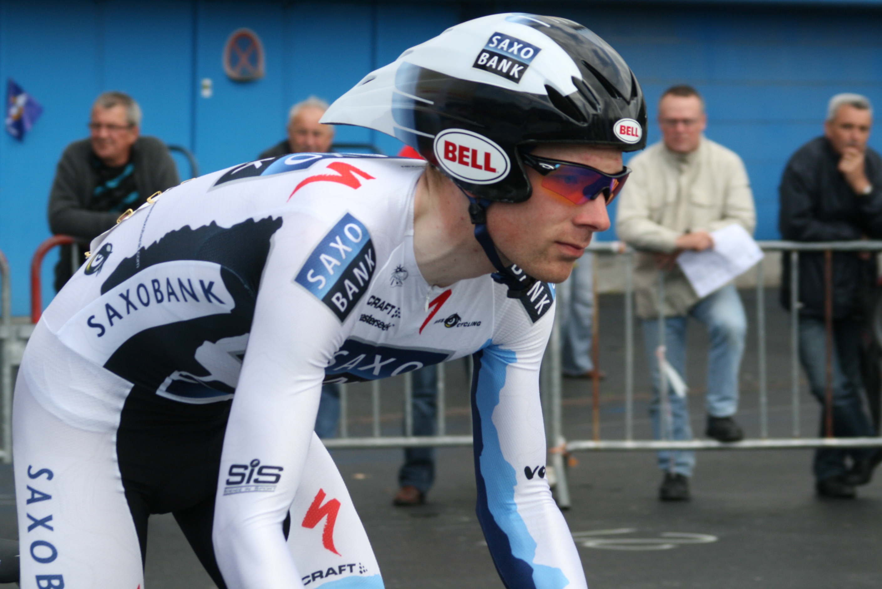 Michael Mørkøv, durant les Quatre jours de Dunkerque 2009, à Douai